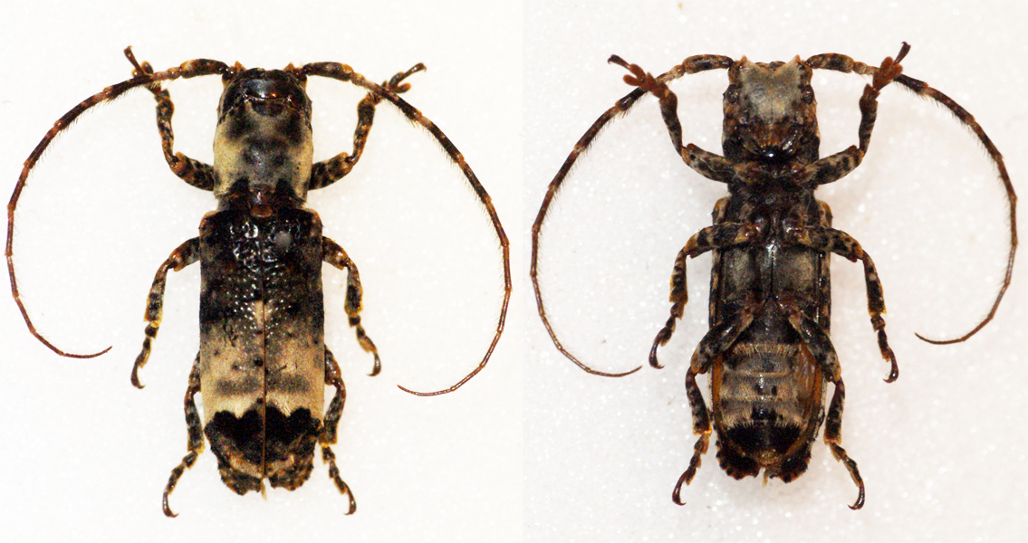 Guérin-Méneville,1849 Sex: Male Data: 11-2012 - Ebogo - Cameroon Size: ?